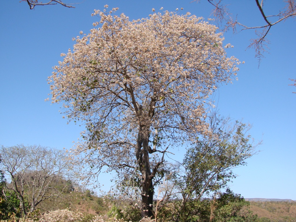 Cordia glabrata - BORAGINACEAE Reserva Extrativista de Recanto das Araras de Terra Ronca - São Domingos - Goiás - Brasil.